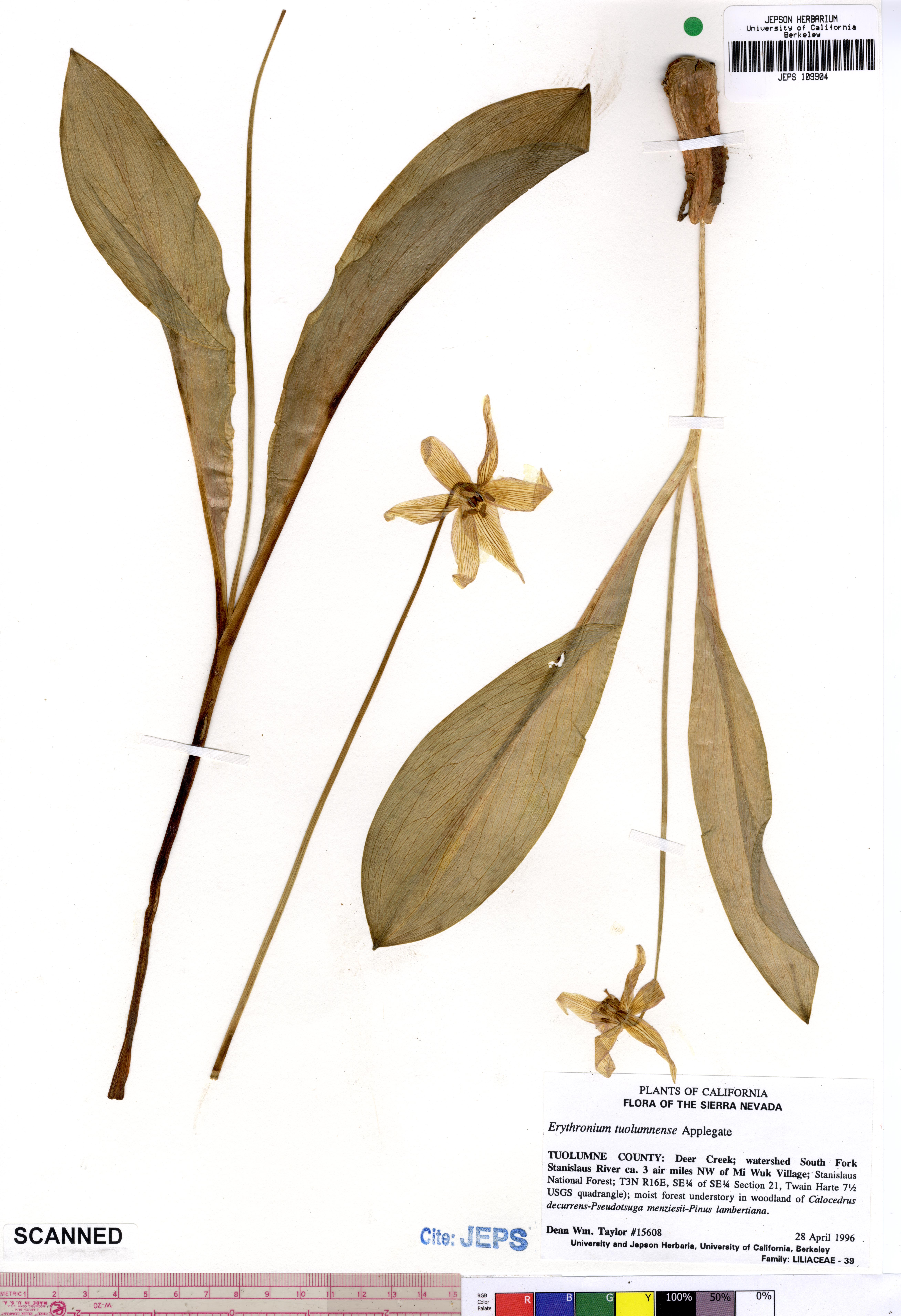 Erythronium tuolumnense JEPS109904